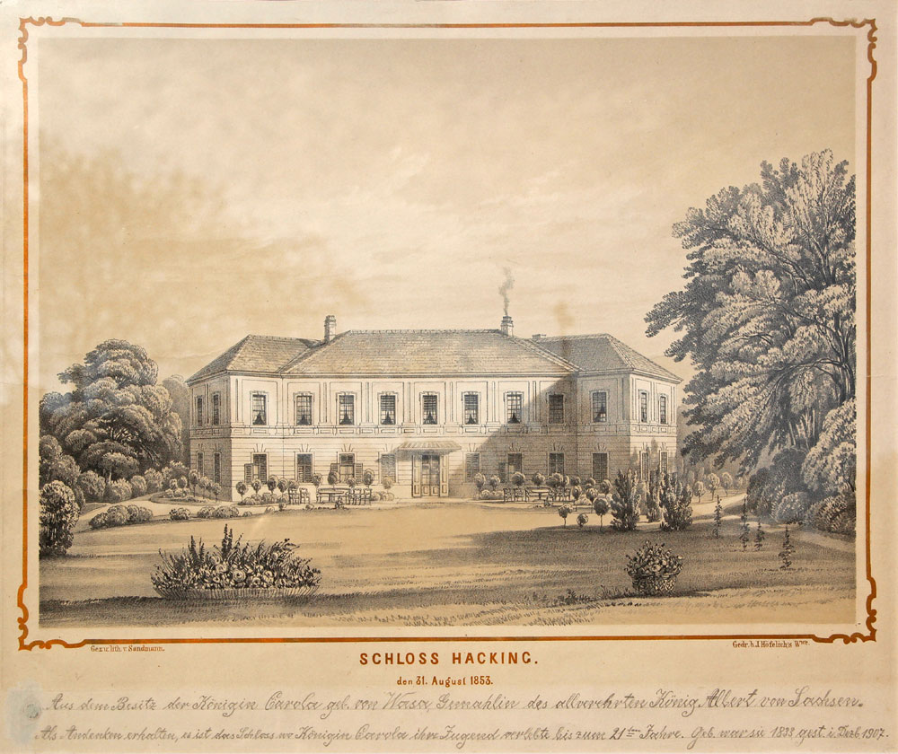 Das Schloss Hacking, auch Hackinger Schlösschen genannt, war ein Schloss in Hietzing. Gezeichnet und lithografiert von Franz Josef Sandmann am 31. August 1853. Das Werk stammt aus dem Besitz der am 5. August 1833 geborenen Carola, Prinzessin von Wasa, die hier ihre Jugend bis zum 21. Lebensjahr verbrachte [1]